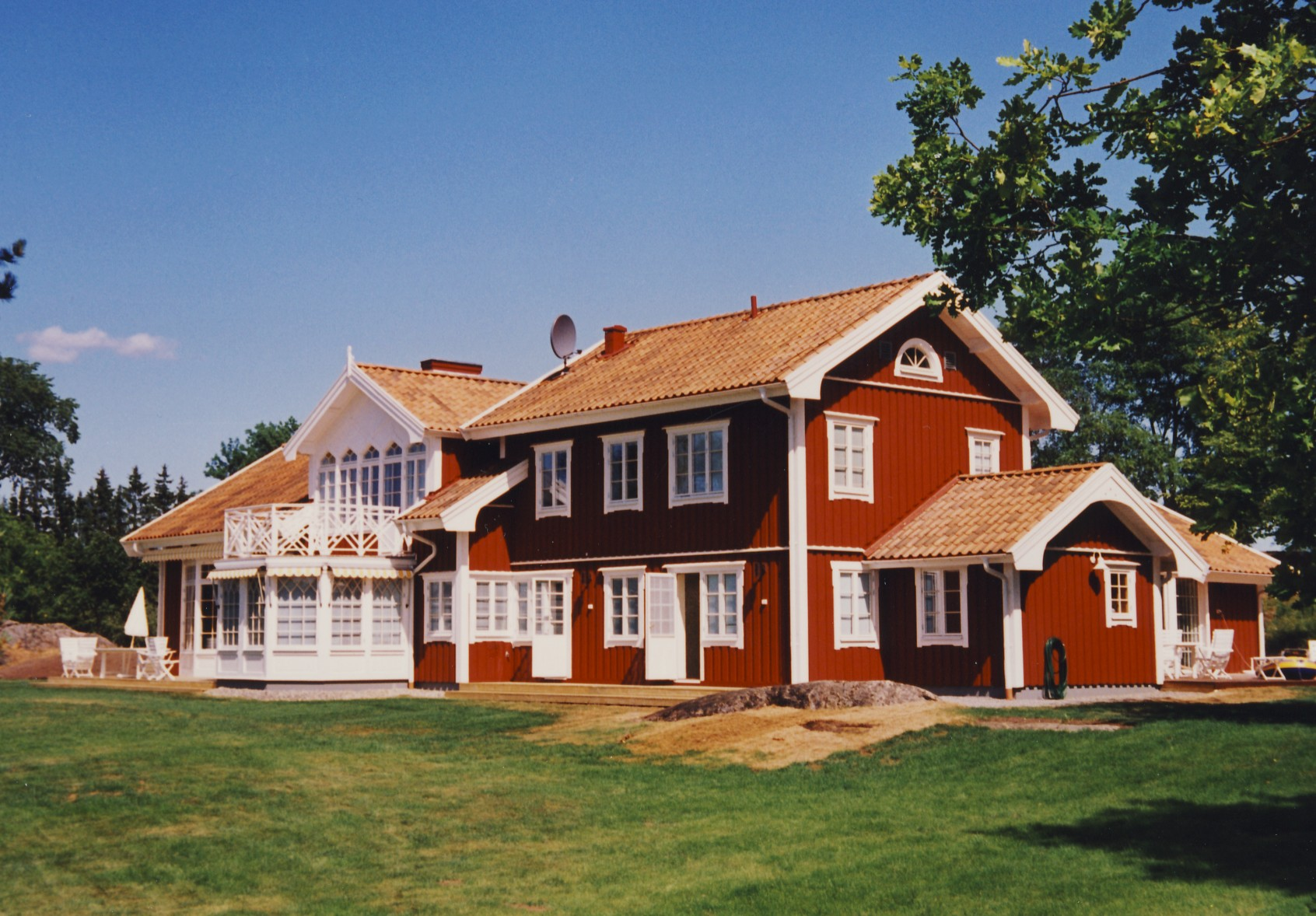 Modern "grosshandlarvilla" för Olle Hartwig ("Hartwig delikatesser") på Häringe, arkitekt Holger Ellgaard